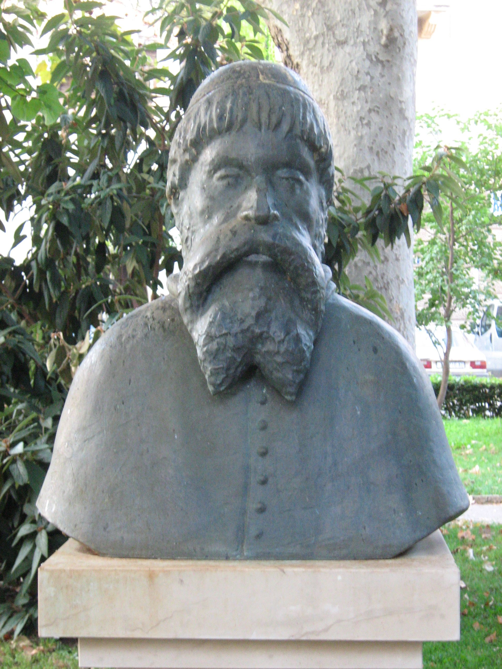 Šimun Kozičić-Benja